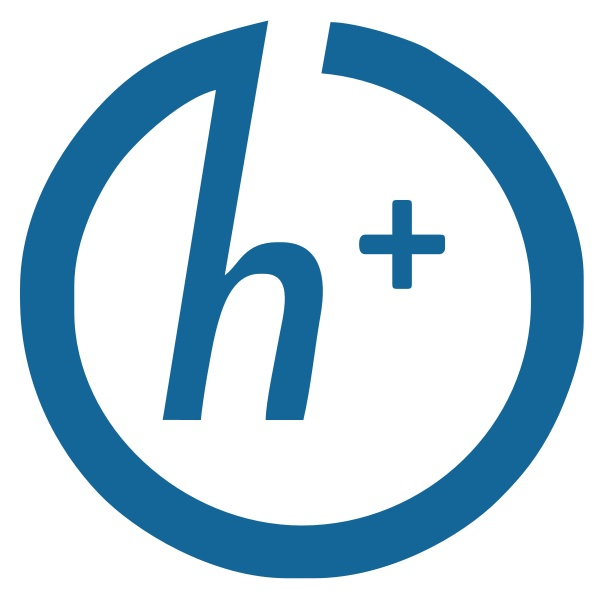 Transhumanismo